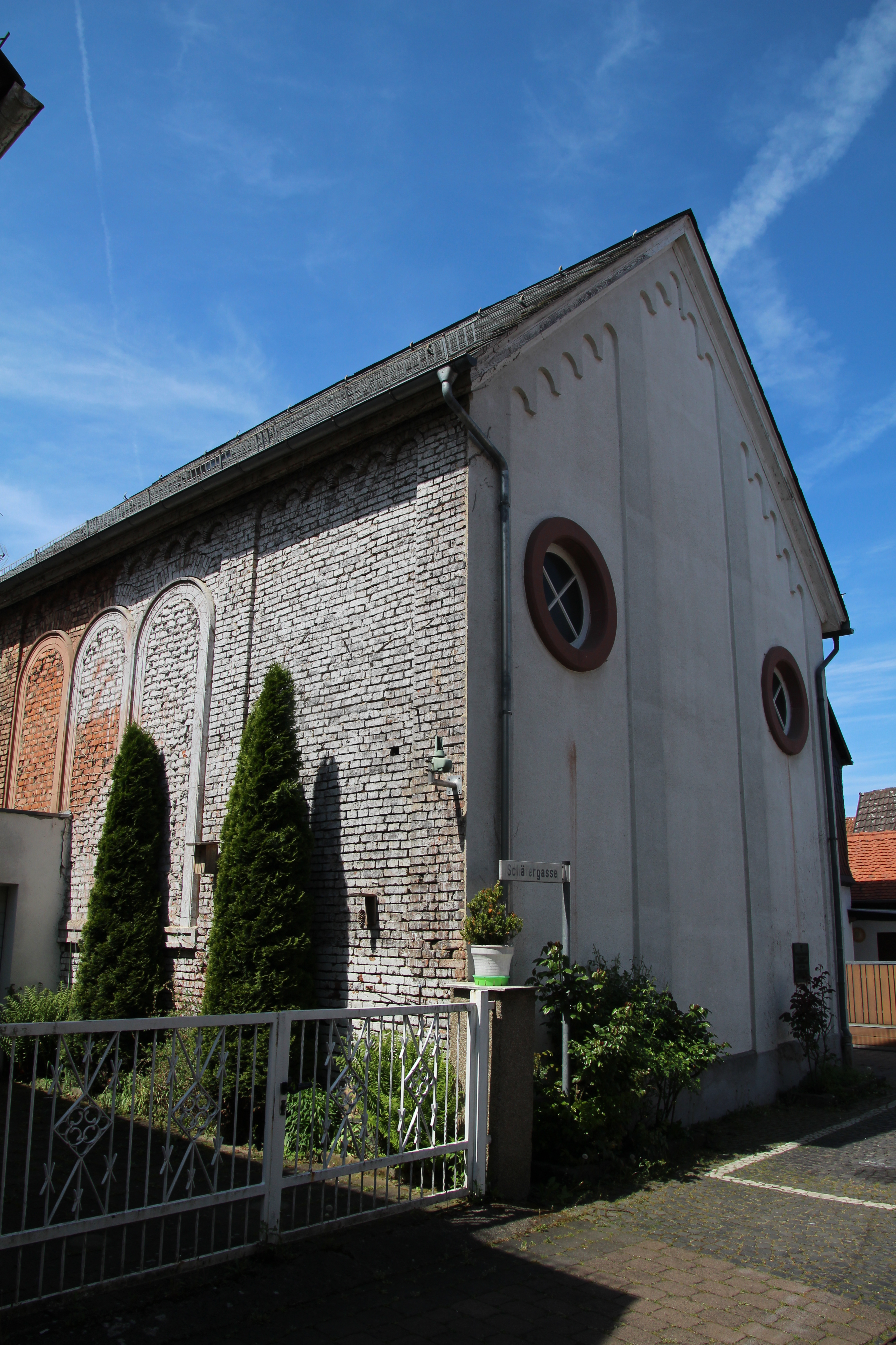 Assenheim - ehem. Synagoge